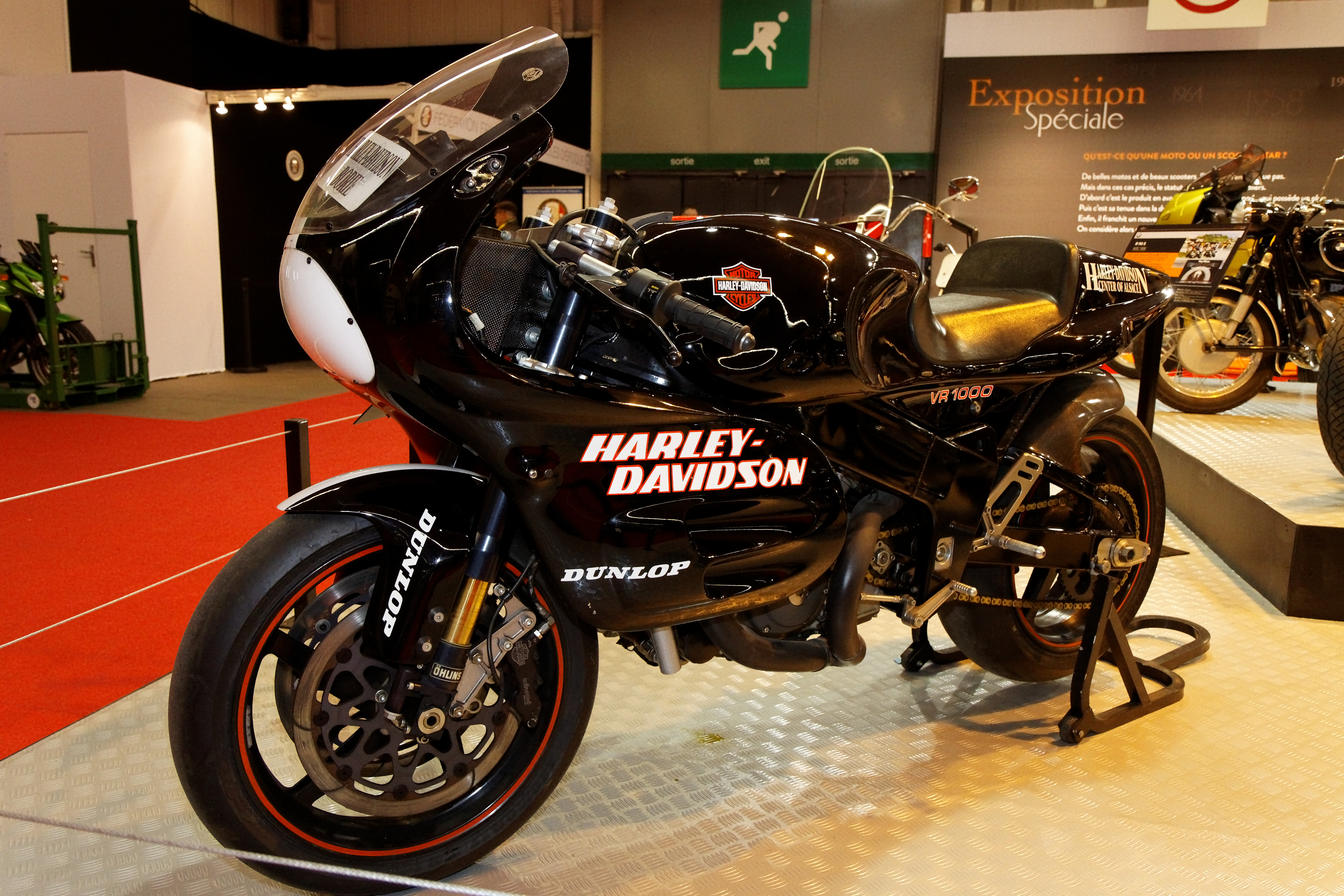 Harley-Davidson VR-1000